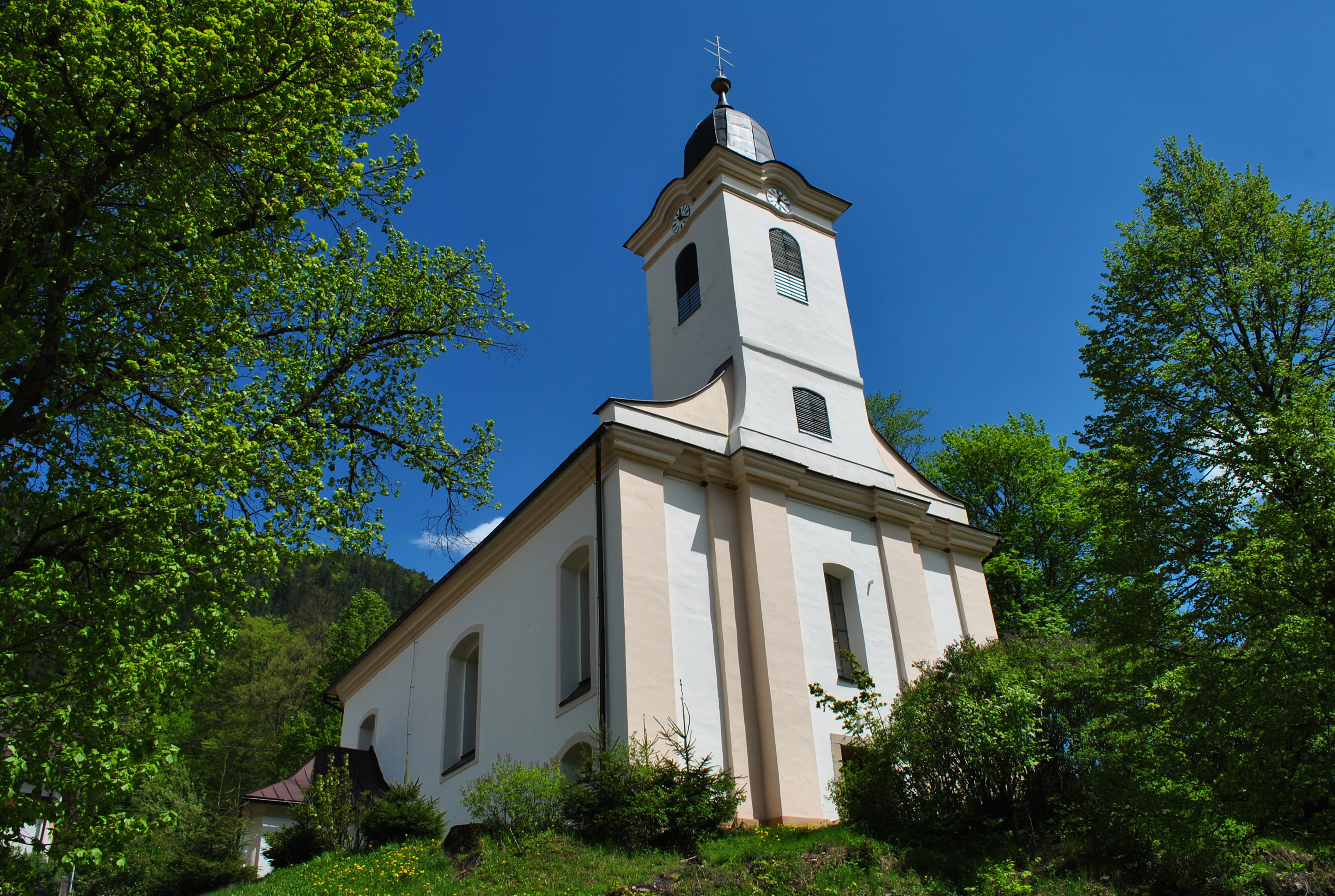 Malužiná - rímsko-katolícky kostol Povýšenia sv. kríža z roku 1816